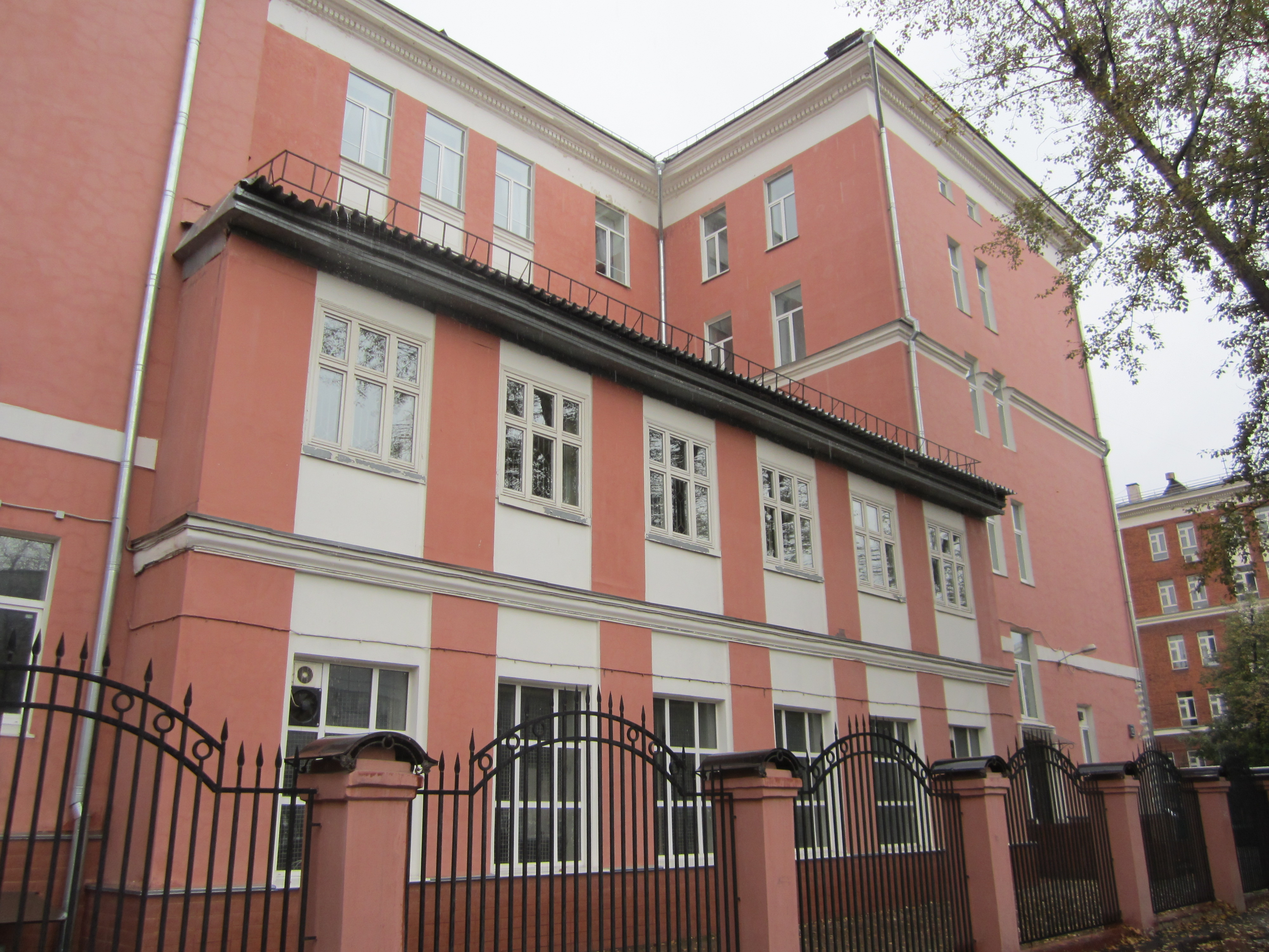 Вид с ул. 3-я Мытищинская